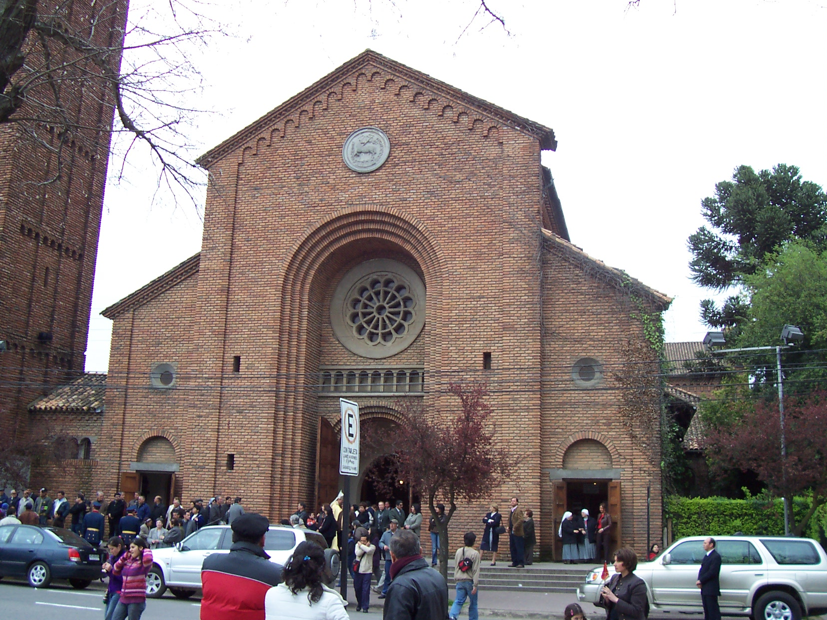 Catedral de Linares, Chile.